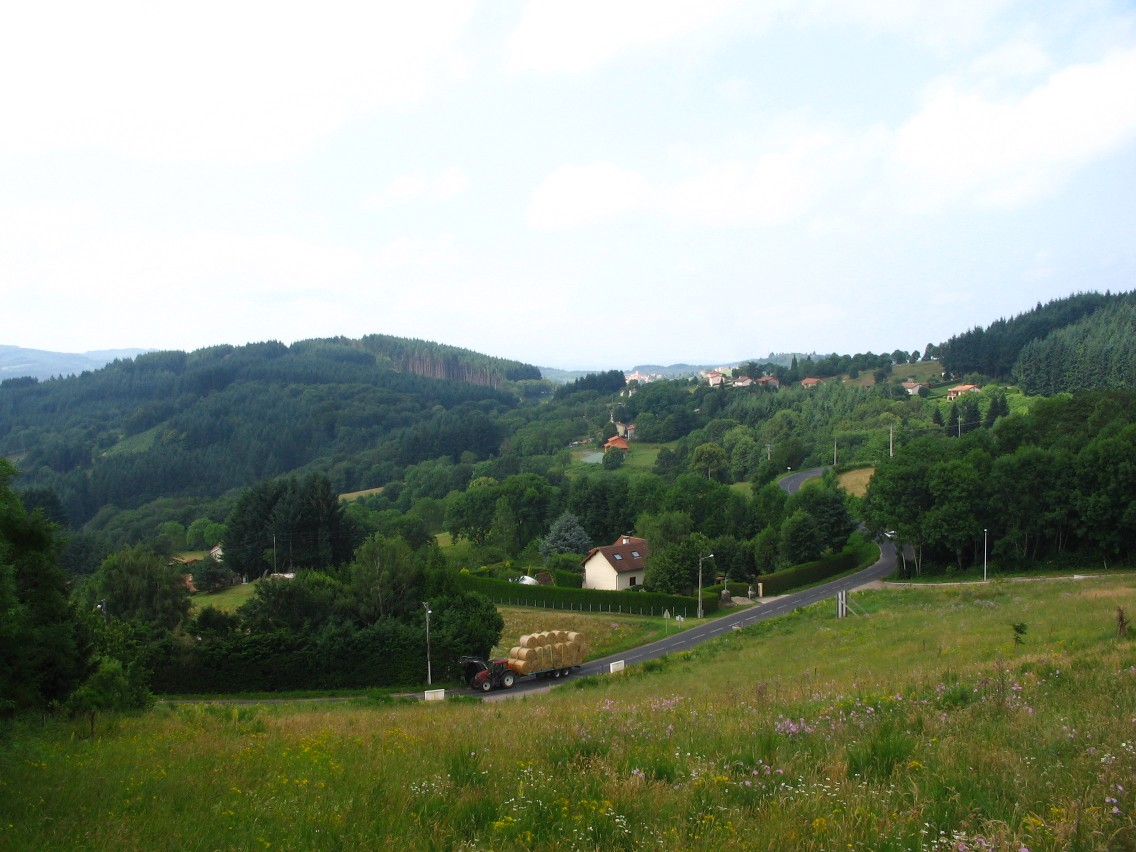 Arrivée ouest de Palladuc (Puy de Dôme), PNR Livradois-Forez, depuis Saint-Rémy sur Durolle, que l'on aperçoit au fond.